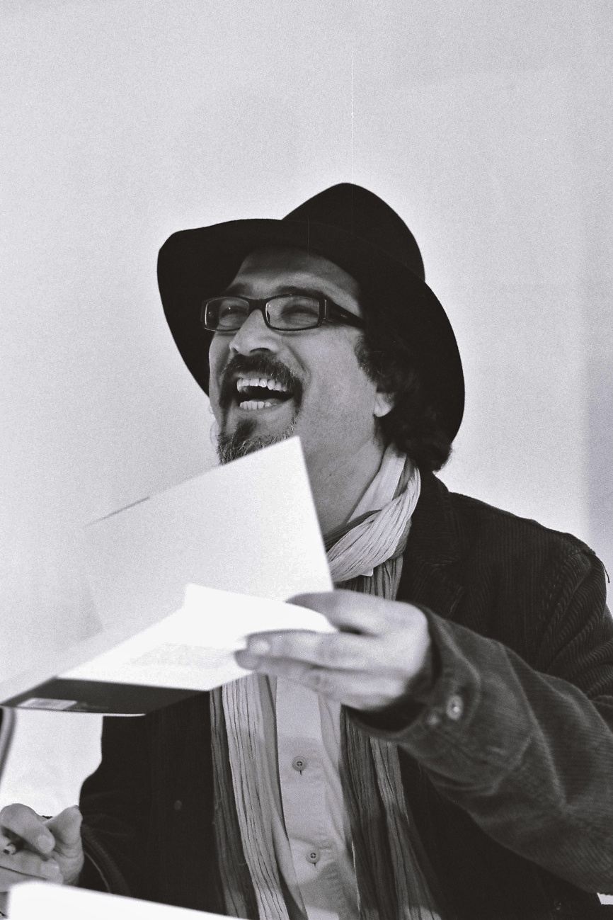 Atiq Rahimi au salon du livre Radio France, 26 novembre 2011